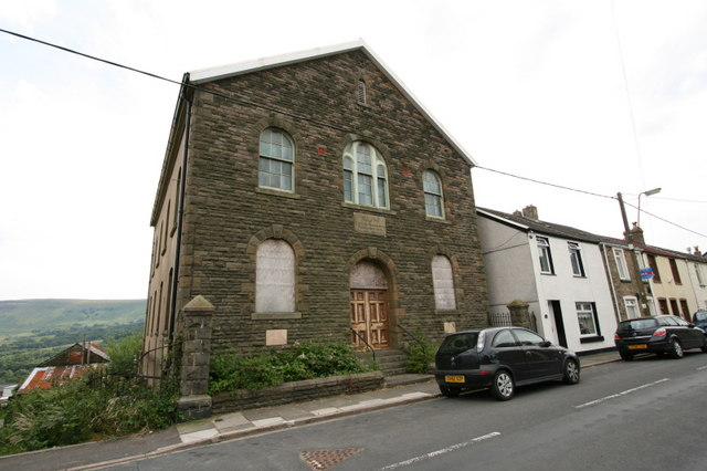 Elim Chapel, Bwllfa Road, Cwmdare, Wales